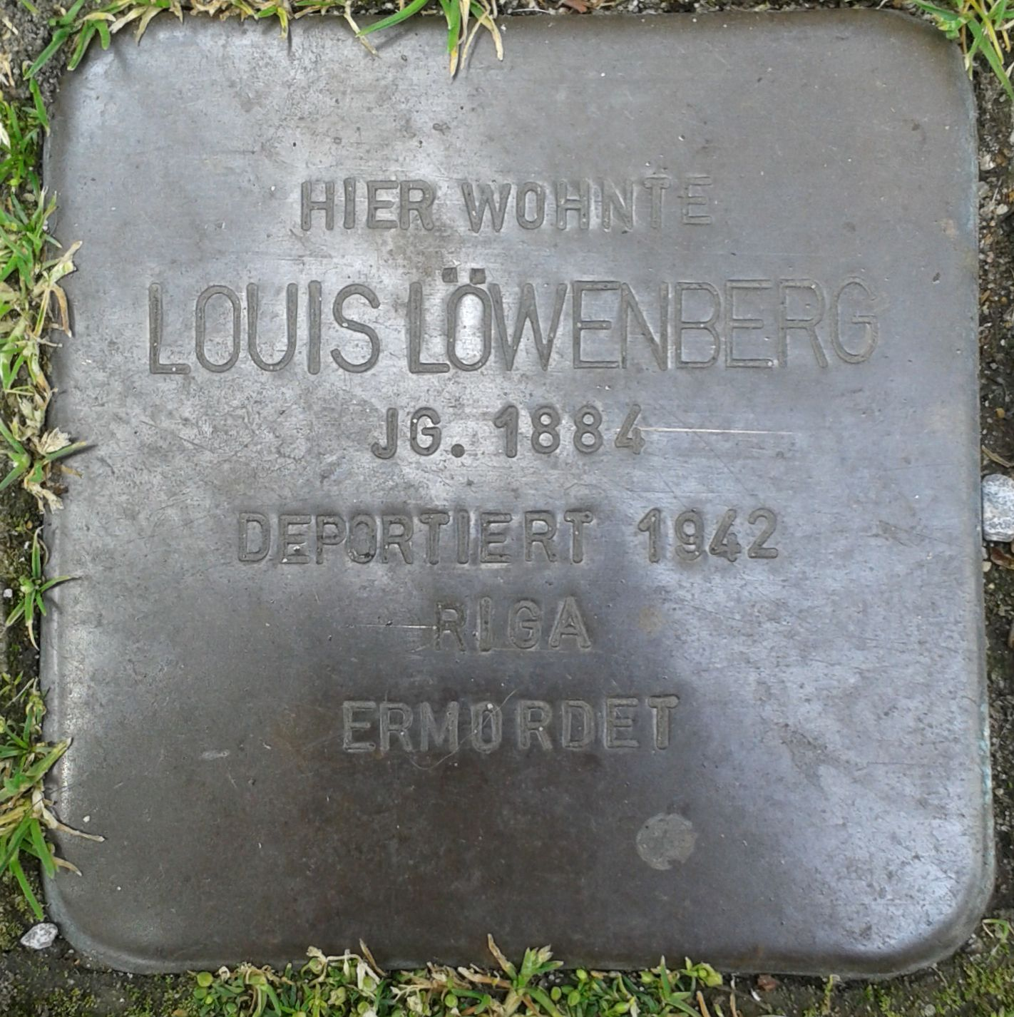 Stolperstein Datteln Münsterstraße 13 Louis Löwenberg